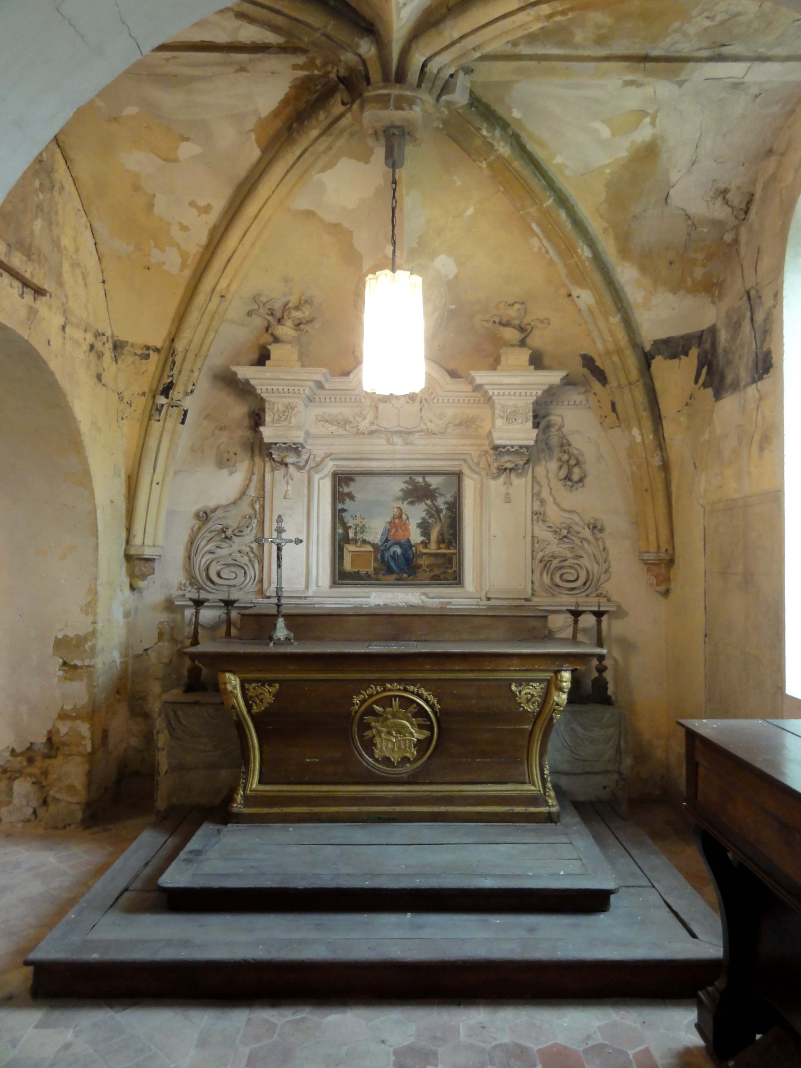 Intérieur de l'église - voir titre.